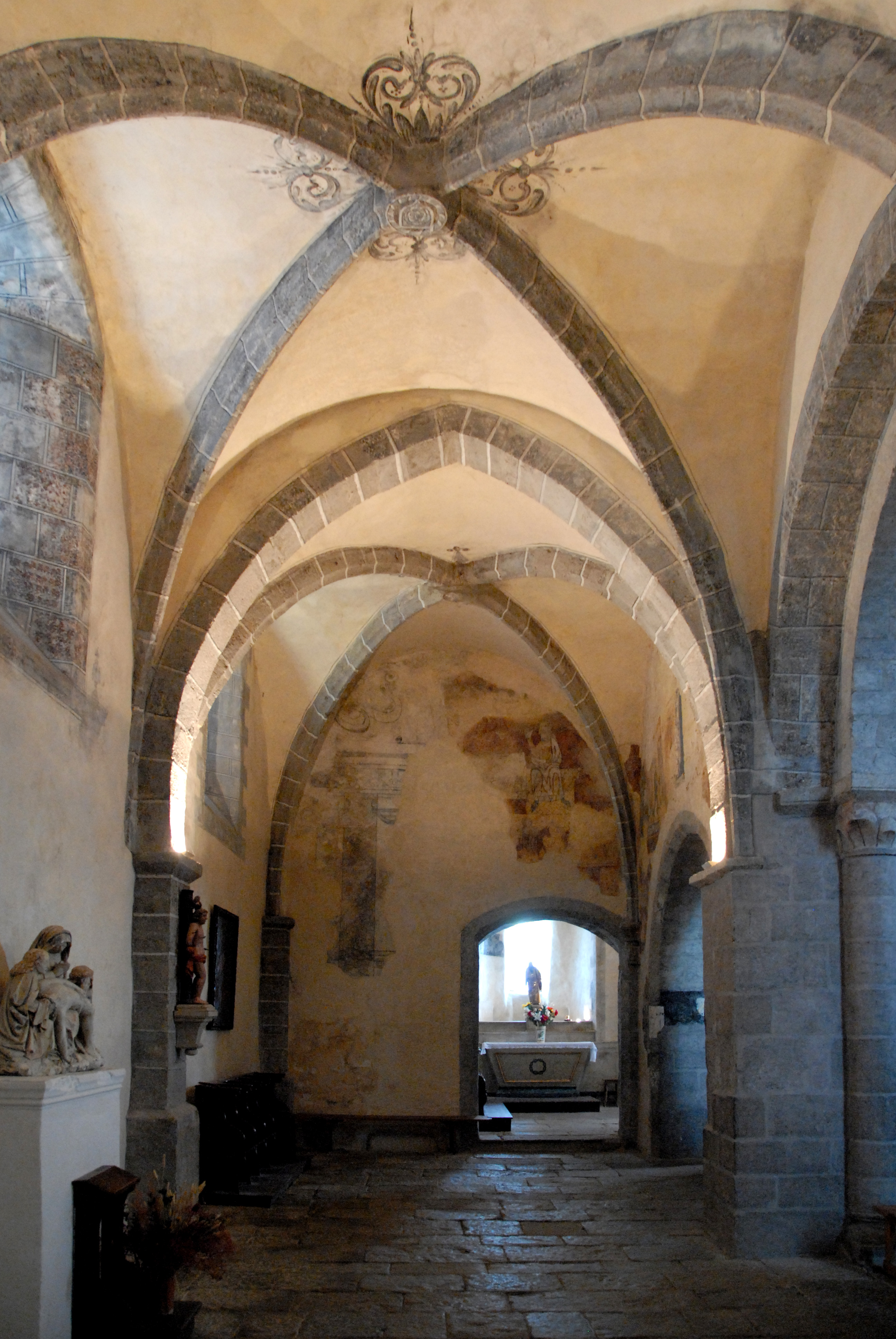 Abteikirche St.-André Lavaudieu, Seitenschiff nach Osten